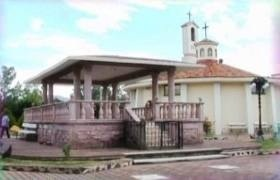 Quiosco y Templo De San Francisco de Asis, Rincon Grande, Ecuandureo, Michoacan